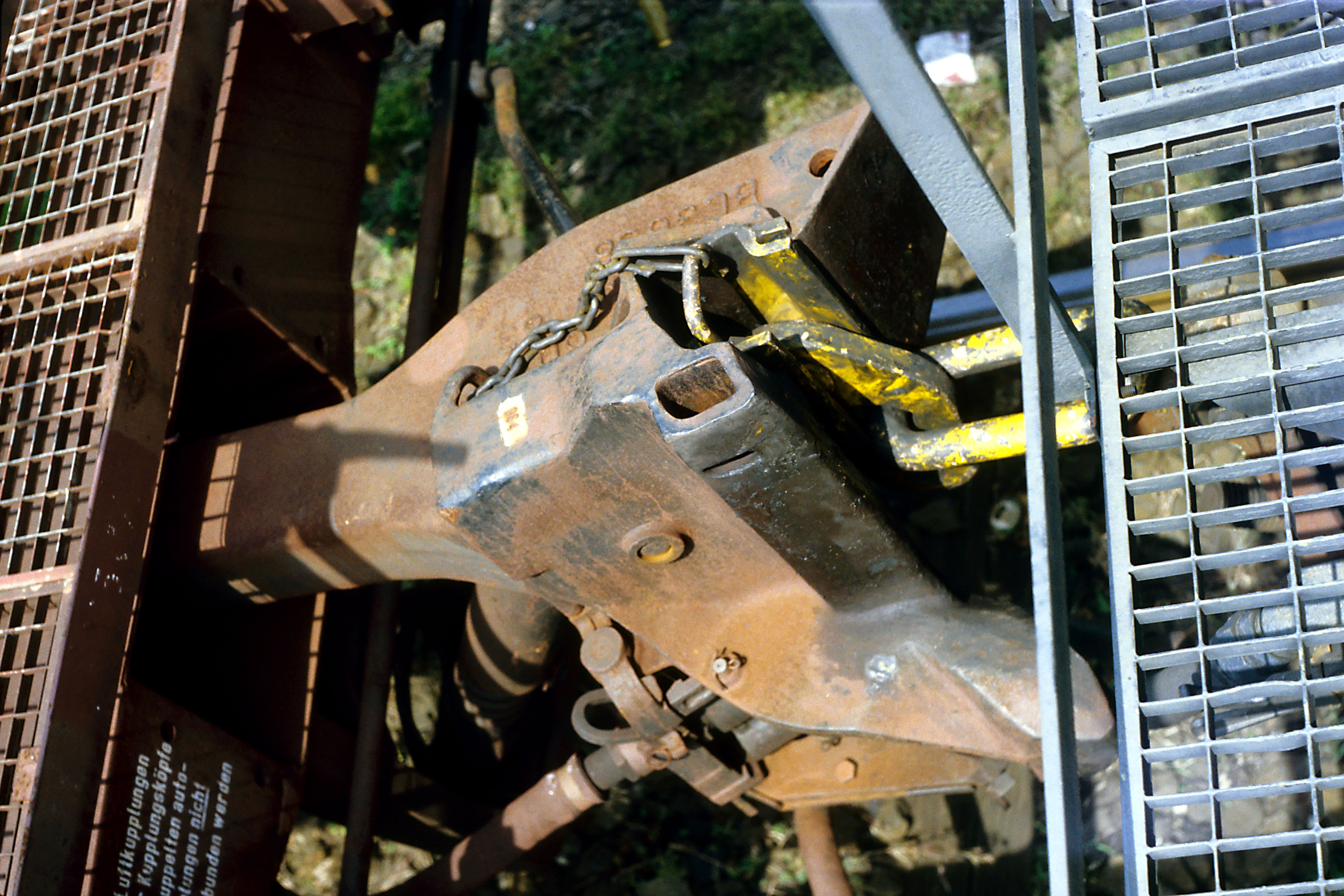 gekuppelte Gemischtkupplung zwischen Willisonprofil (hier Bauart Intermat) und Schraubenkupplung